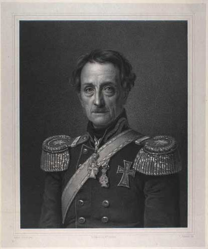 Peter Friderich Quaade (1779-1850), Danish general